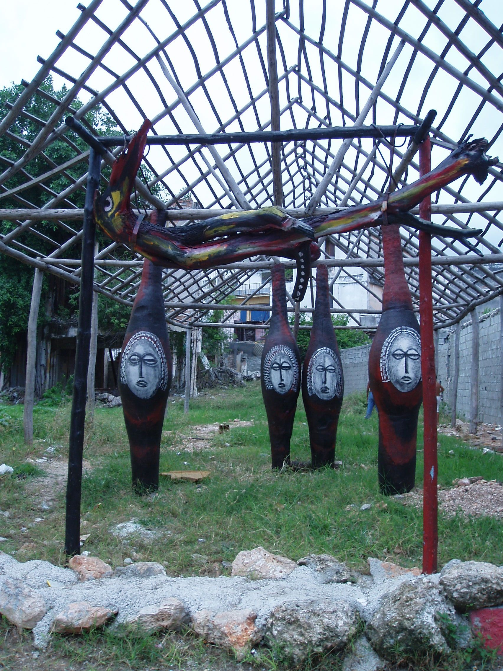 Santeria cult place in Hababa. Miejsce kultu santerii w Hawanie.